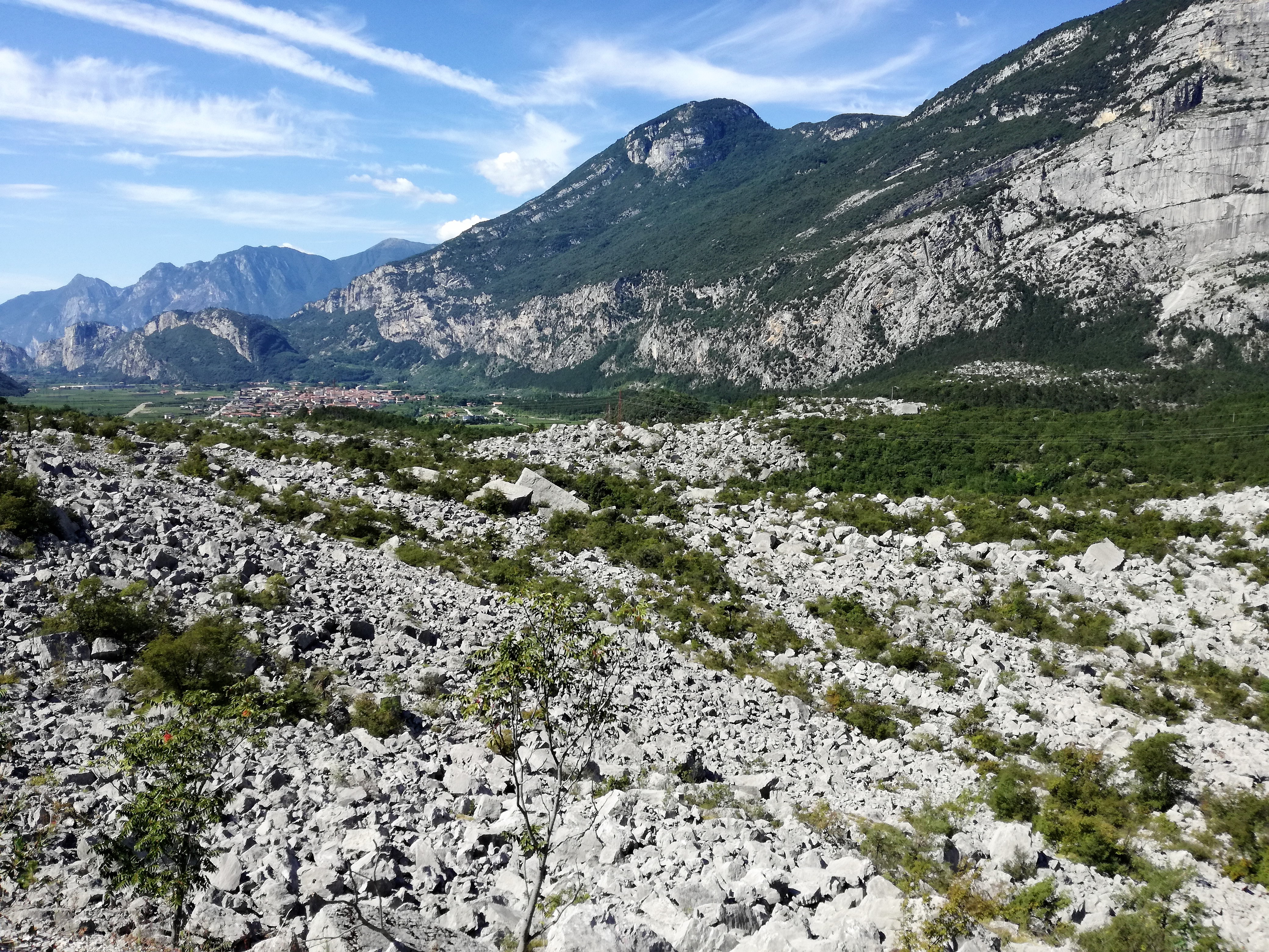 Marocche di Dro